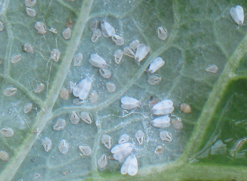 zelfgemaakte foto van witte vlieg op boerenkool; half november, volwassen exemplaren, larven en poppen